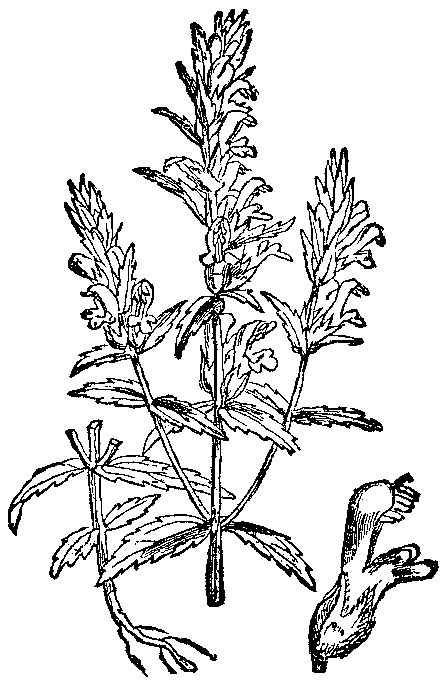 Slika 243. Rudeča smetlíka. (Euphrásia Odontítes.) [sic!] - zdaj znana kot "rdeča zobnica" (Odontites vernus subsp. serotinus (Dumort.)Corb.)